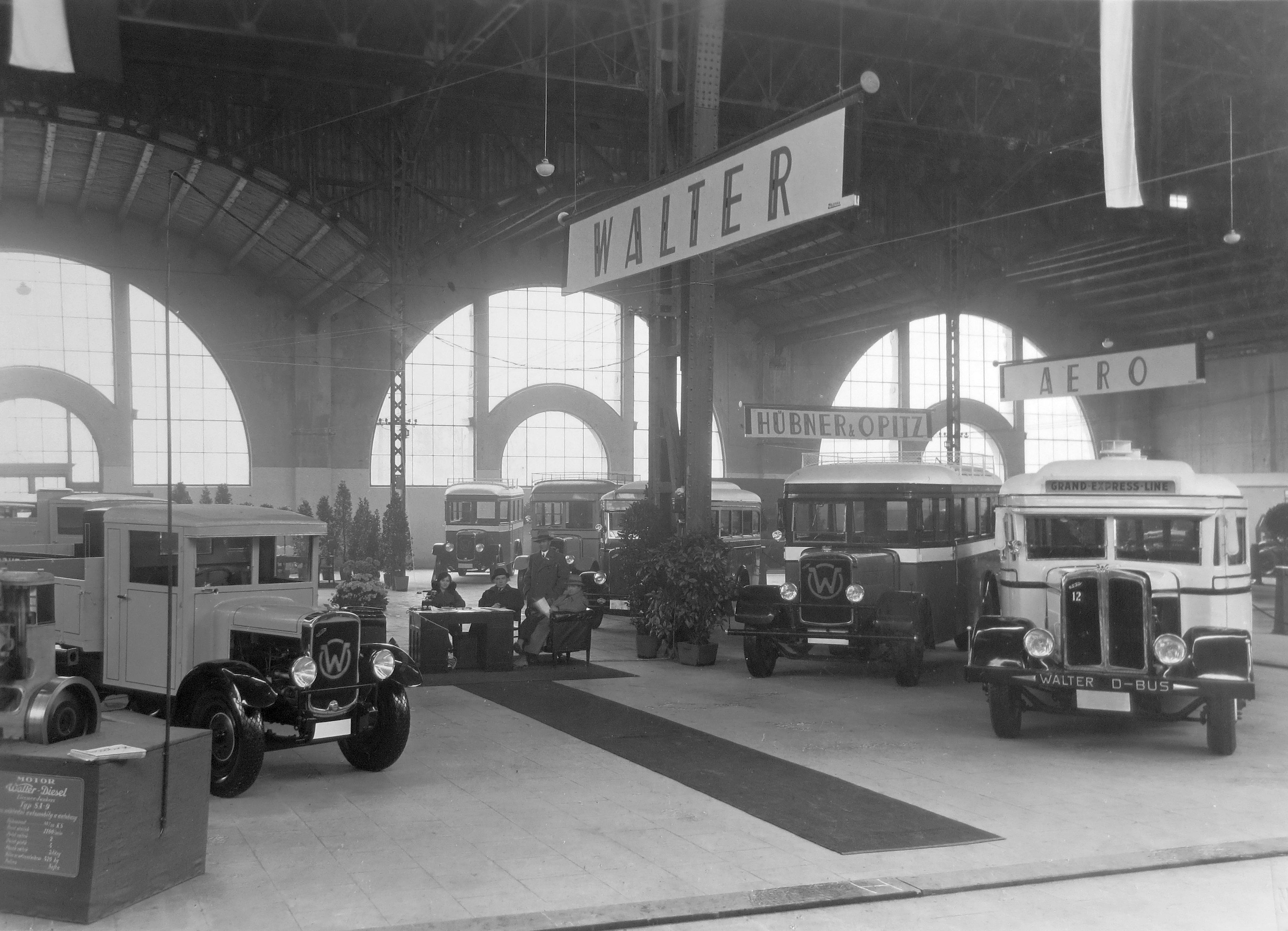 Walter PN a Walter D-Bus v popředí, v pozadí Walter Comercial na stánku Walter při pražském autosalonu 1931